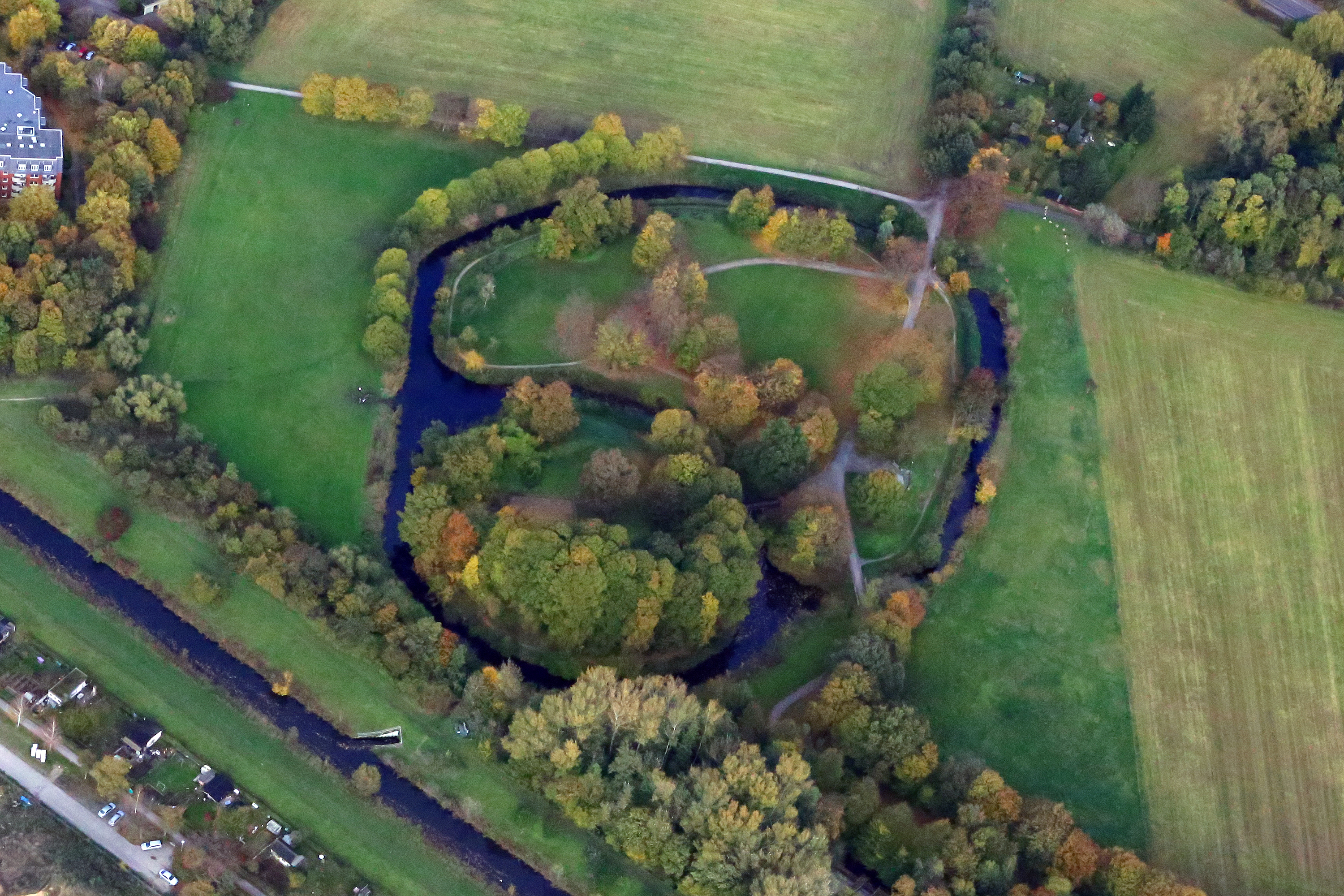 Luftbild Burghügel Hamm Mark 2013